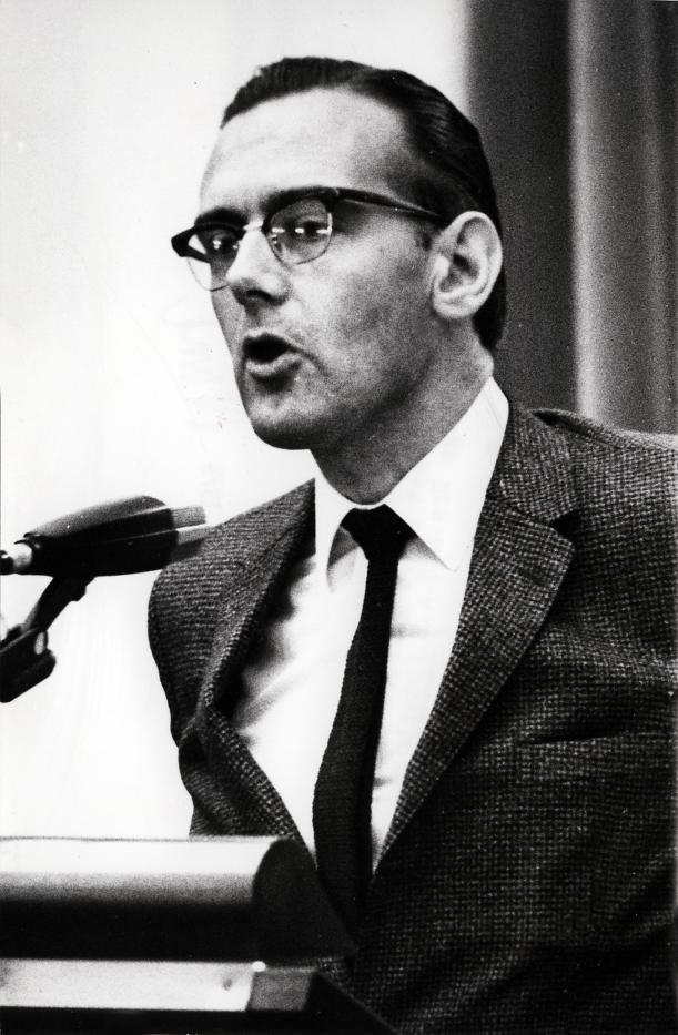 H.A.C.M. Notenboom, financieel deskundige van de KVP in de Tweede Kamer. Den Haag, Nederland, 9 oktober 1968.